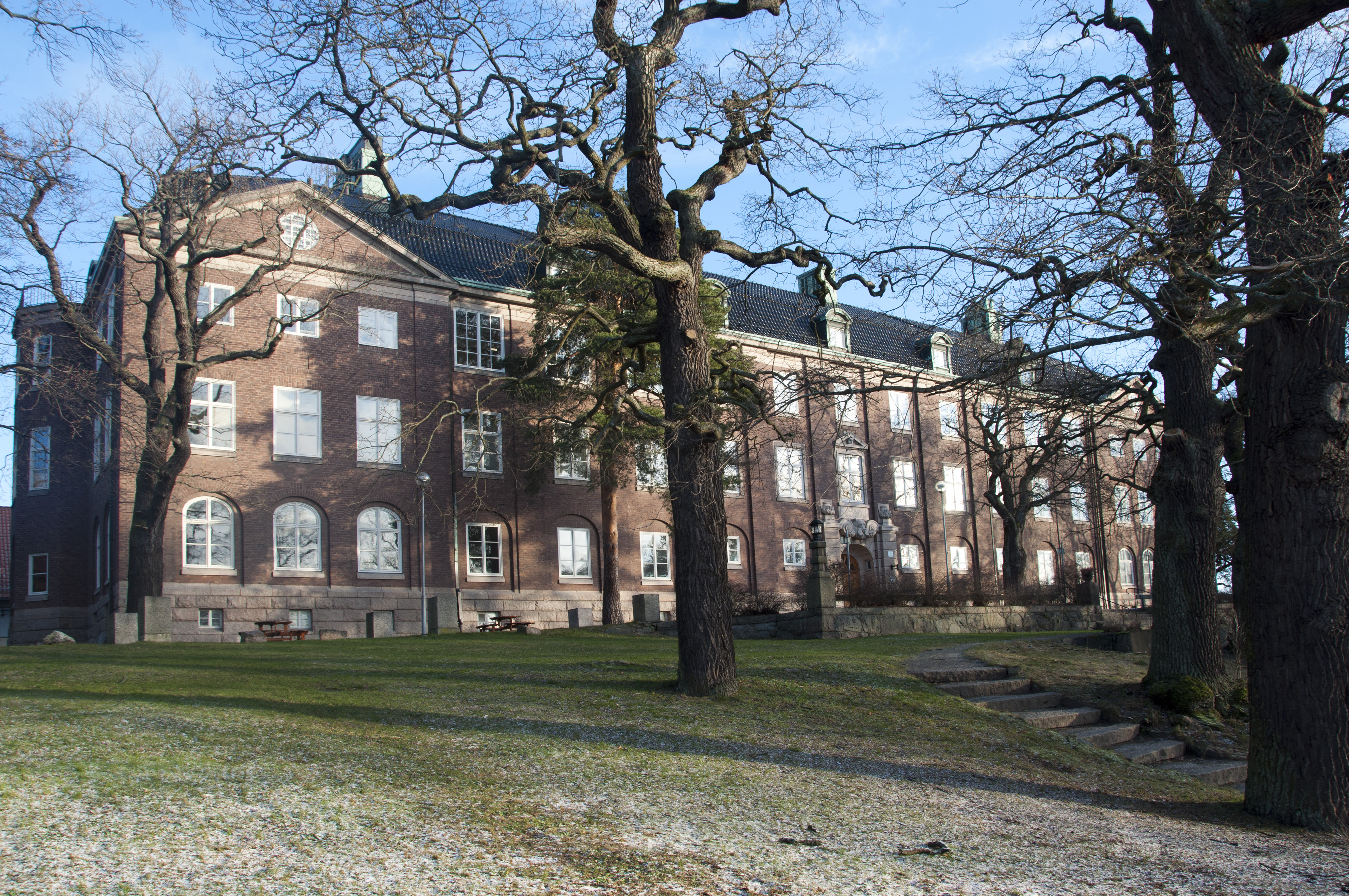 Skogshögskolan, Frescati hage, Stockholm. Arkitekt Charles Lindholm. Byggnadsår 1917